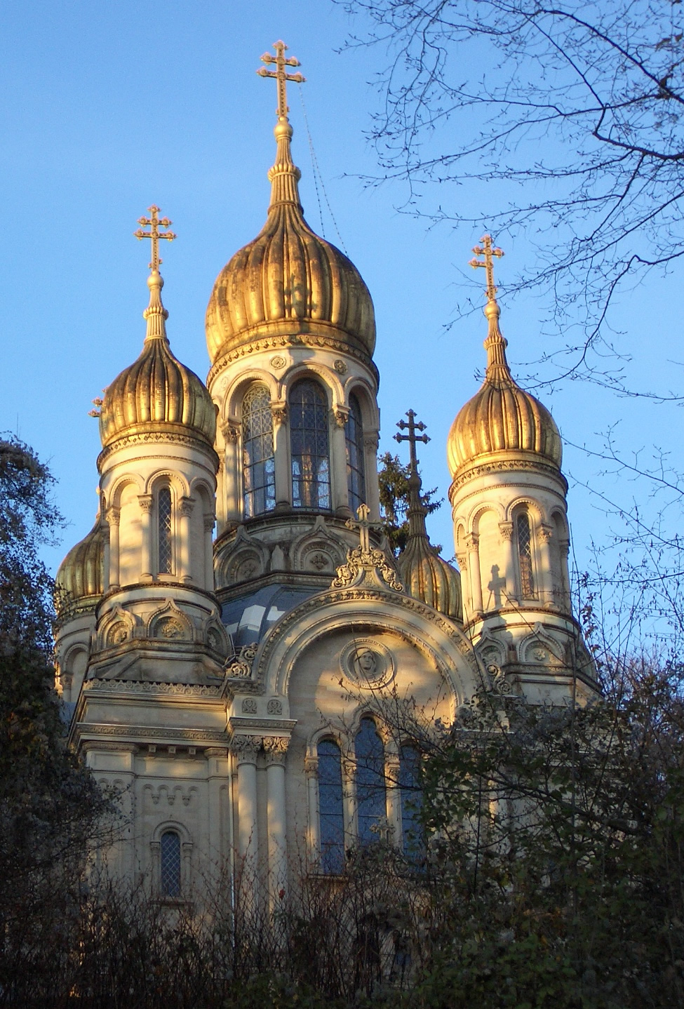 Russische Kirche Wiesbaden, selbst fotografiert